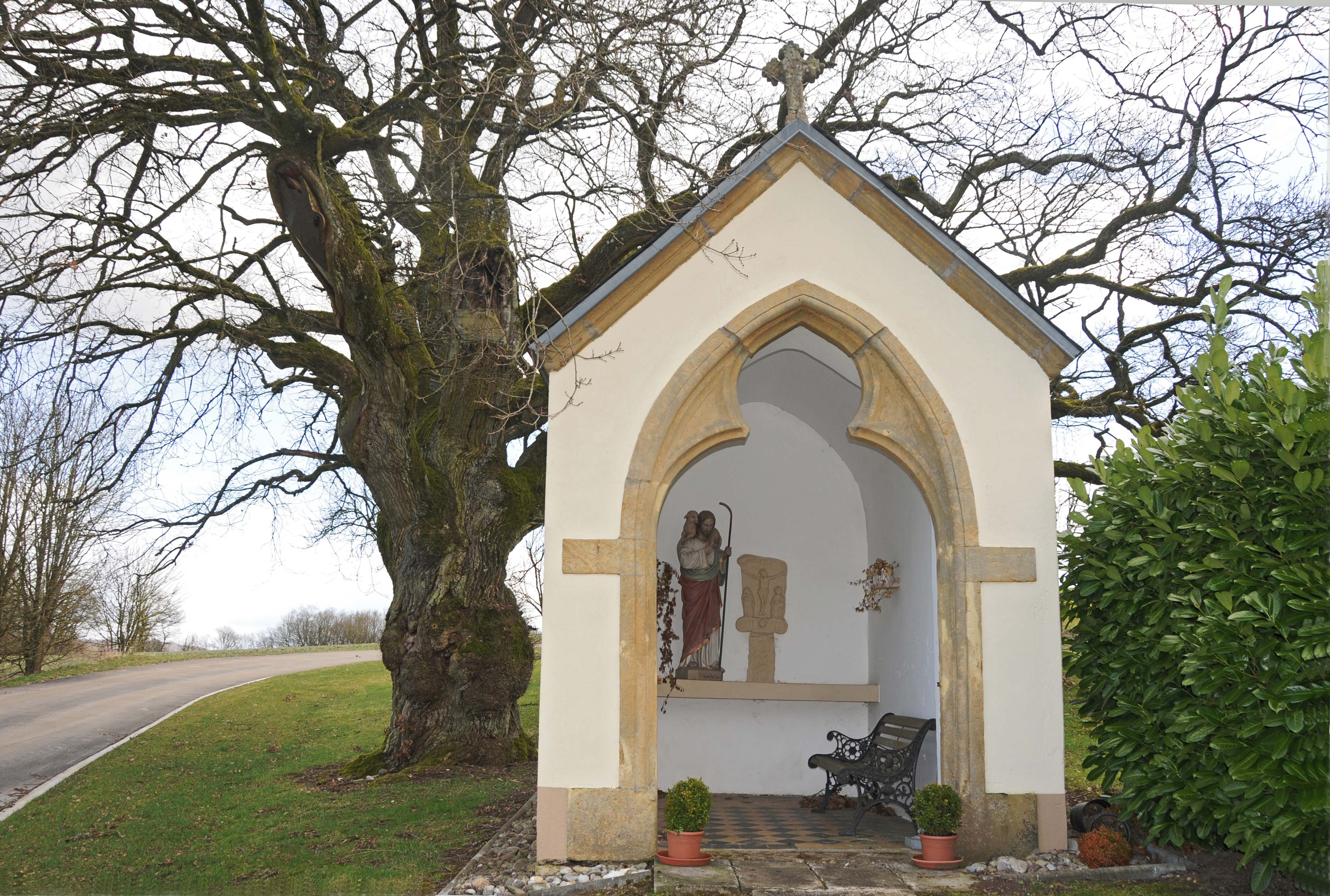 Kapell an Eech um Engelshaff..